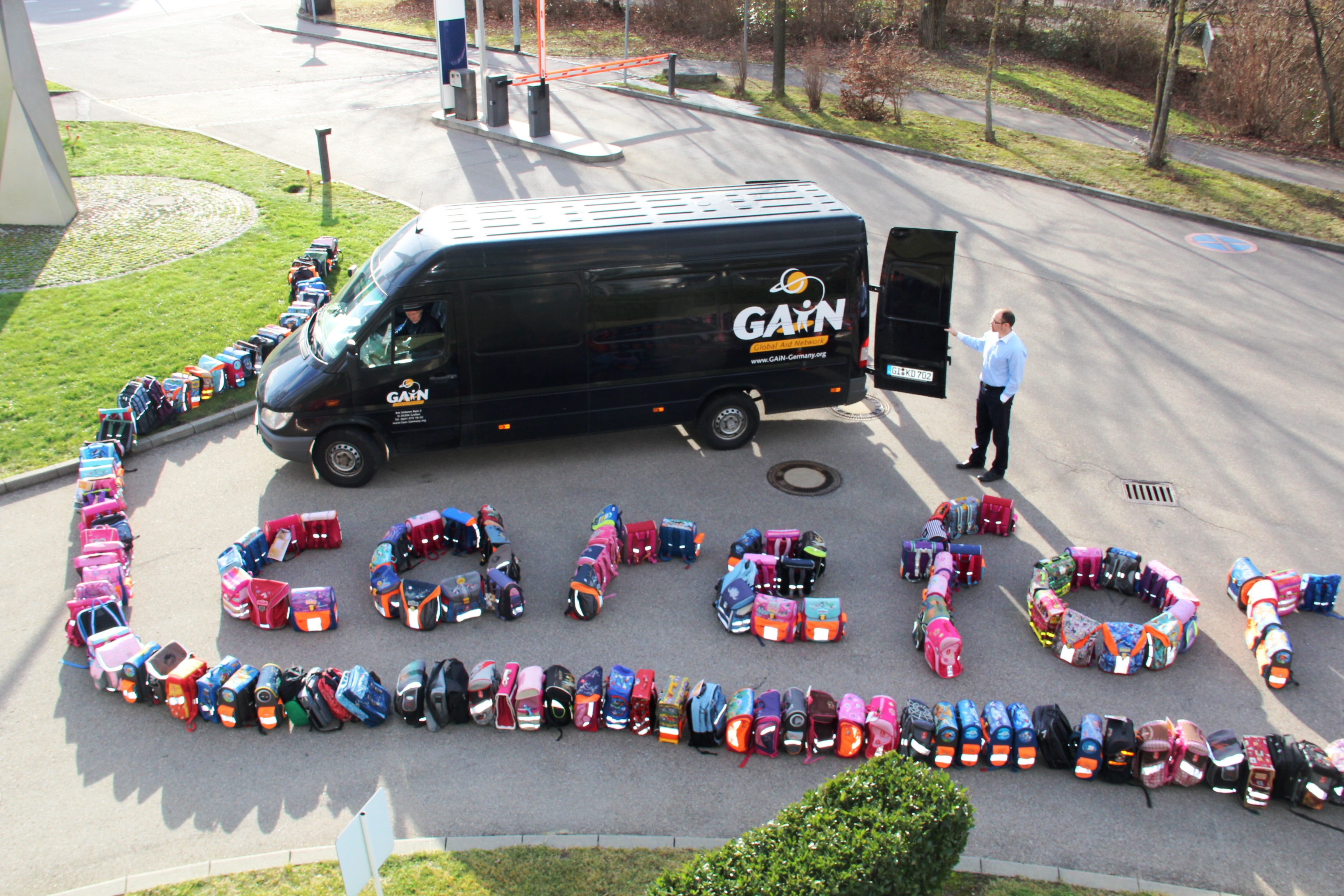 GAiN-Transporter für Sammlung gebrauchter Schulranzen - hier bei Care for Kids in Stuttgart